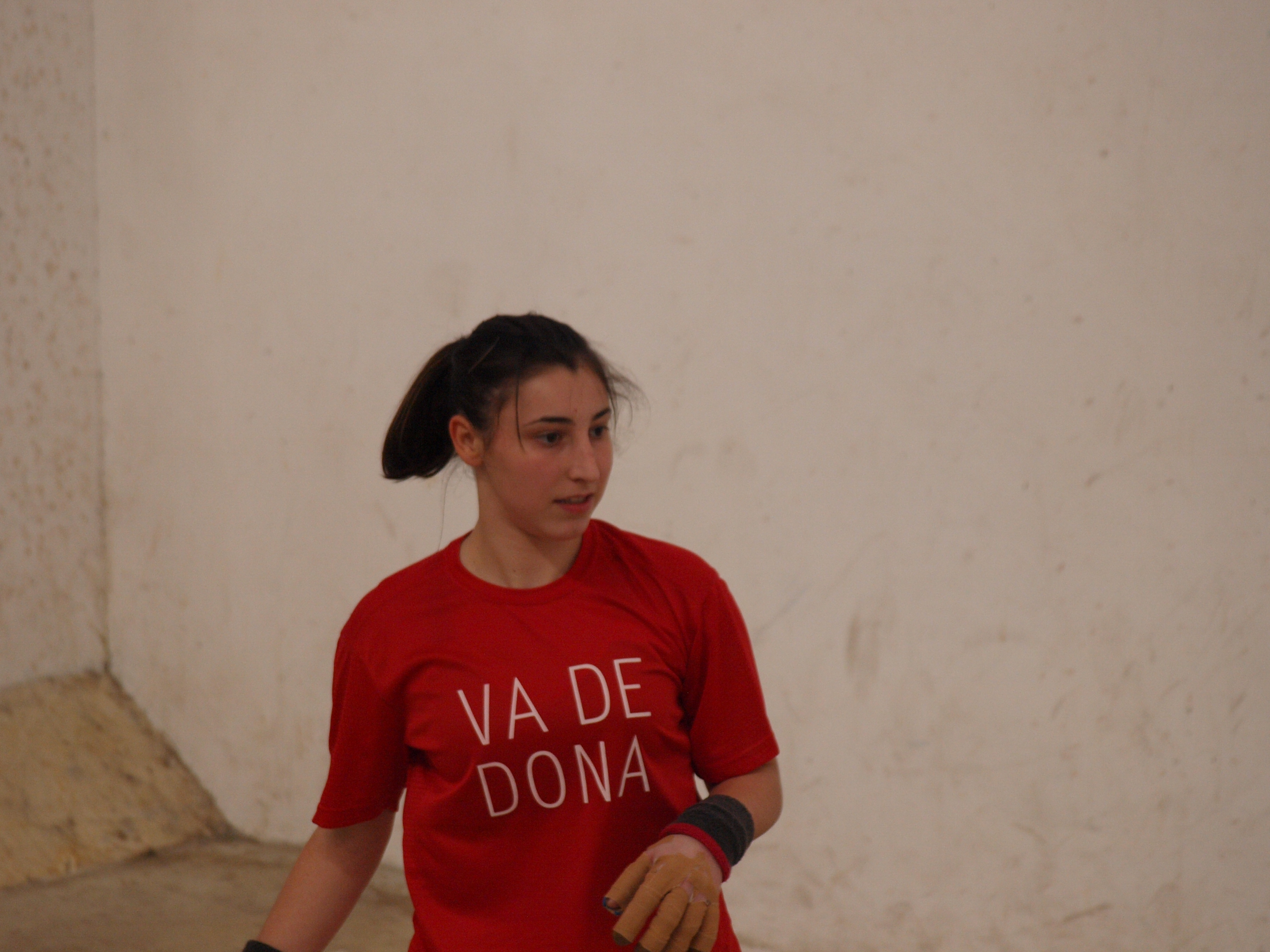 Va de Dona, jornada especial de Raspall femení i mixt organitzada per la FPV al Trinquet de Pelayo.Amparo de Montcada.